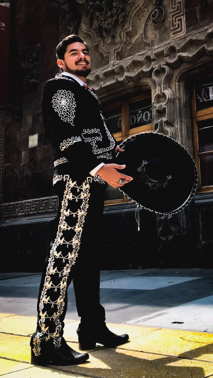 un mariachi en la ciudad de mexico en la av madero, portando el traje con orgullo.